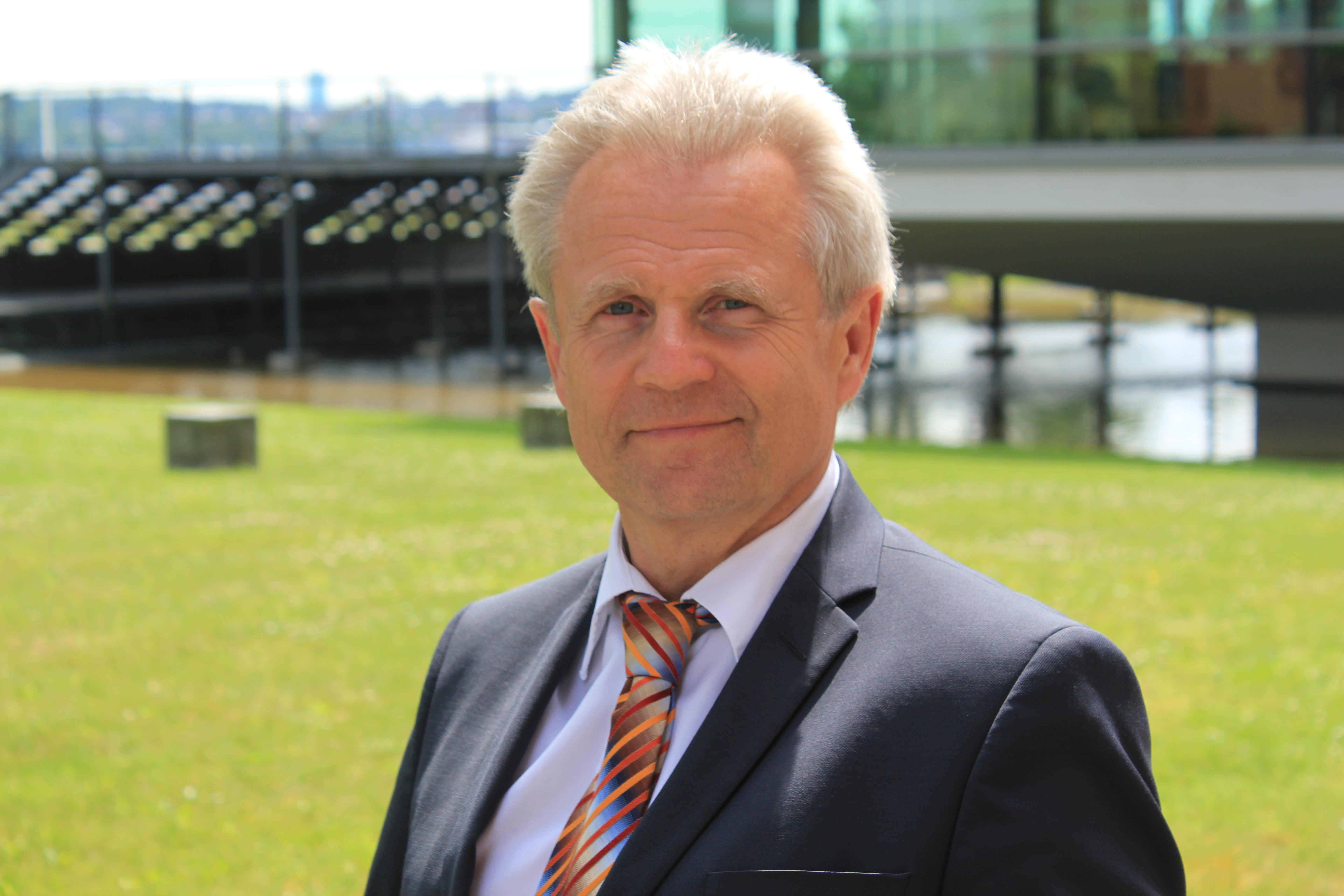 Dunckel im Juni 2017